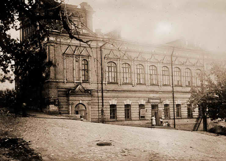 Самара. Иверский монастырь. Трапезная.